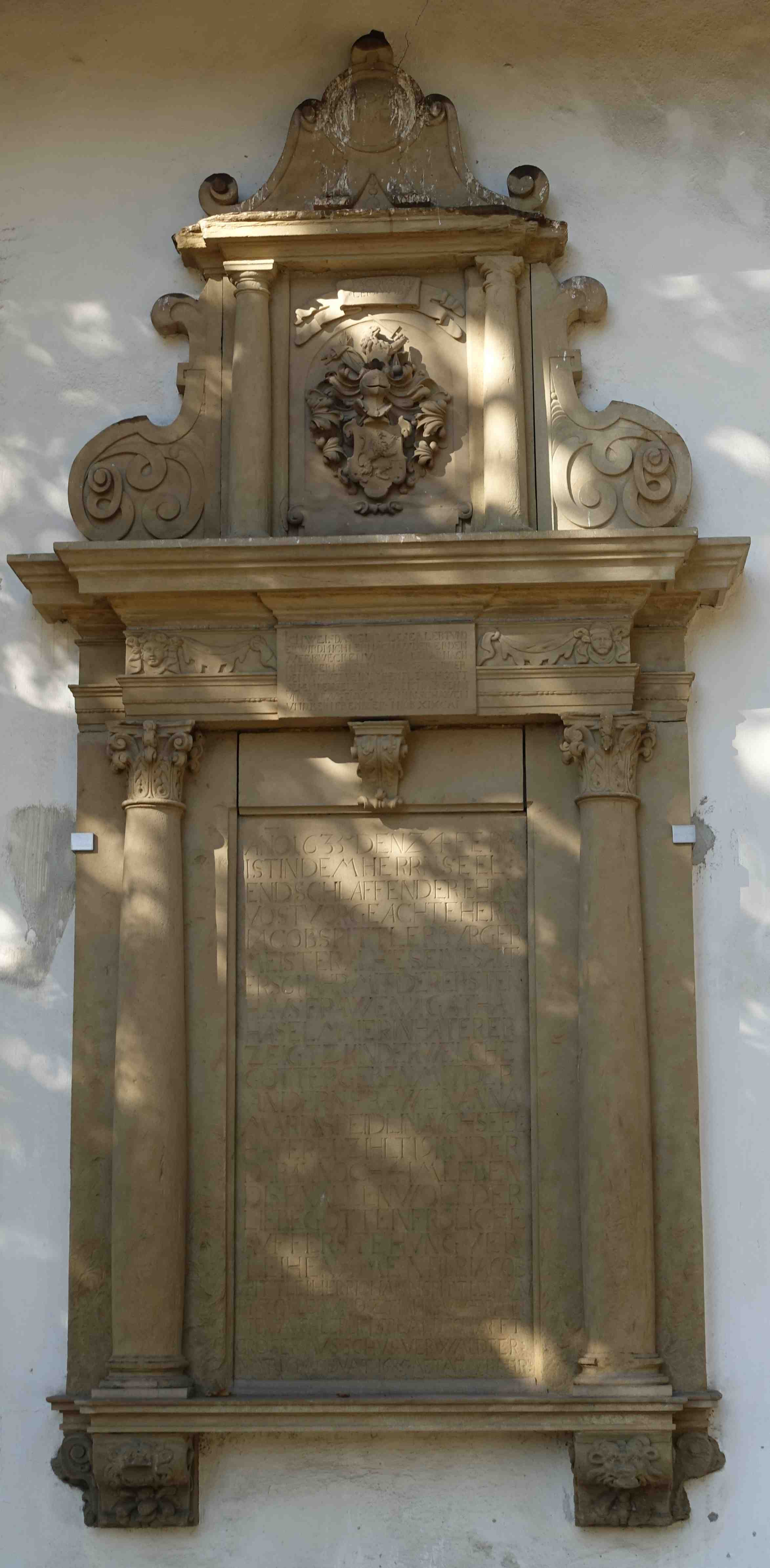 Epitaph an der Südseite der Uffkirche auf dem Uff-Kirchhof in Stuttgart-Bad Cannstatt für den Cannstatter Bürgermeister, Spitalmeister und Hauptzoller Jakob Spittler (1574–1635), seine erste Frau Agatha Haselmaier und seine zweite Frau Anna Maria Speidel.